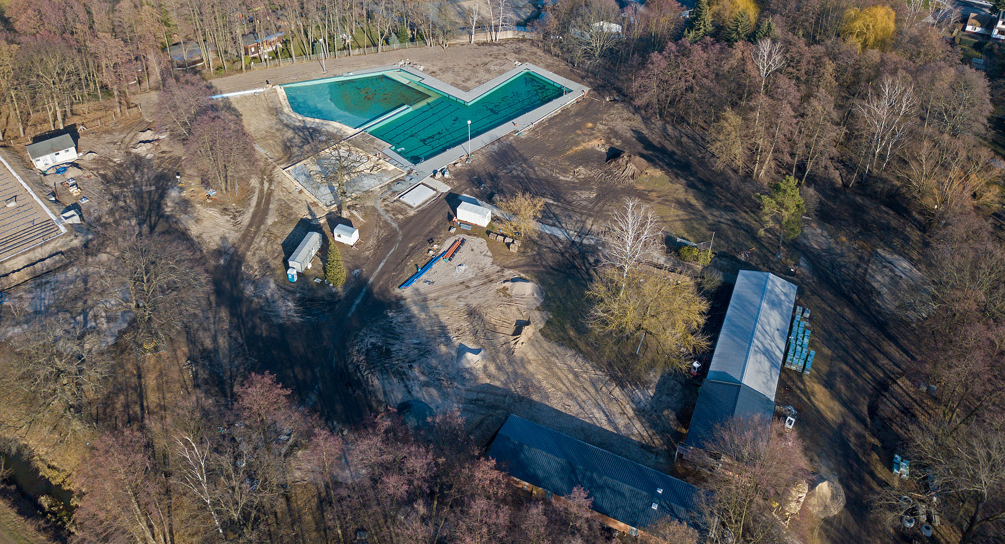 Freibad Hammermühle, Umbau 2018, Luftbild vom 17.02.2019